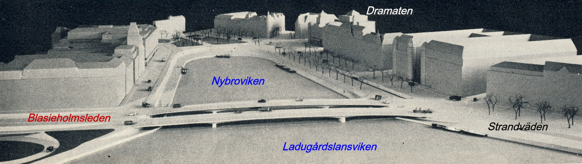 Modell till förslaget om Blasieholmsleden 1966, kompl med text av Holger Ellgaard